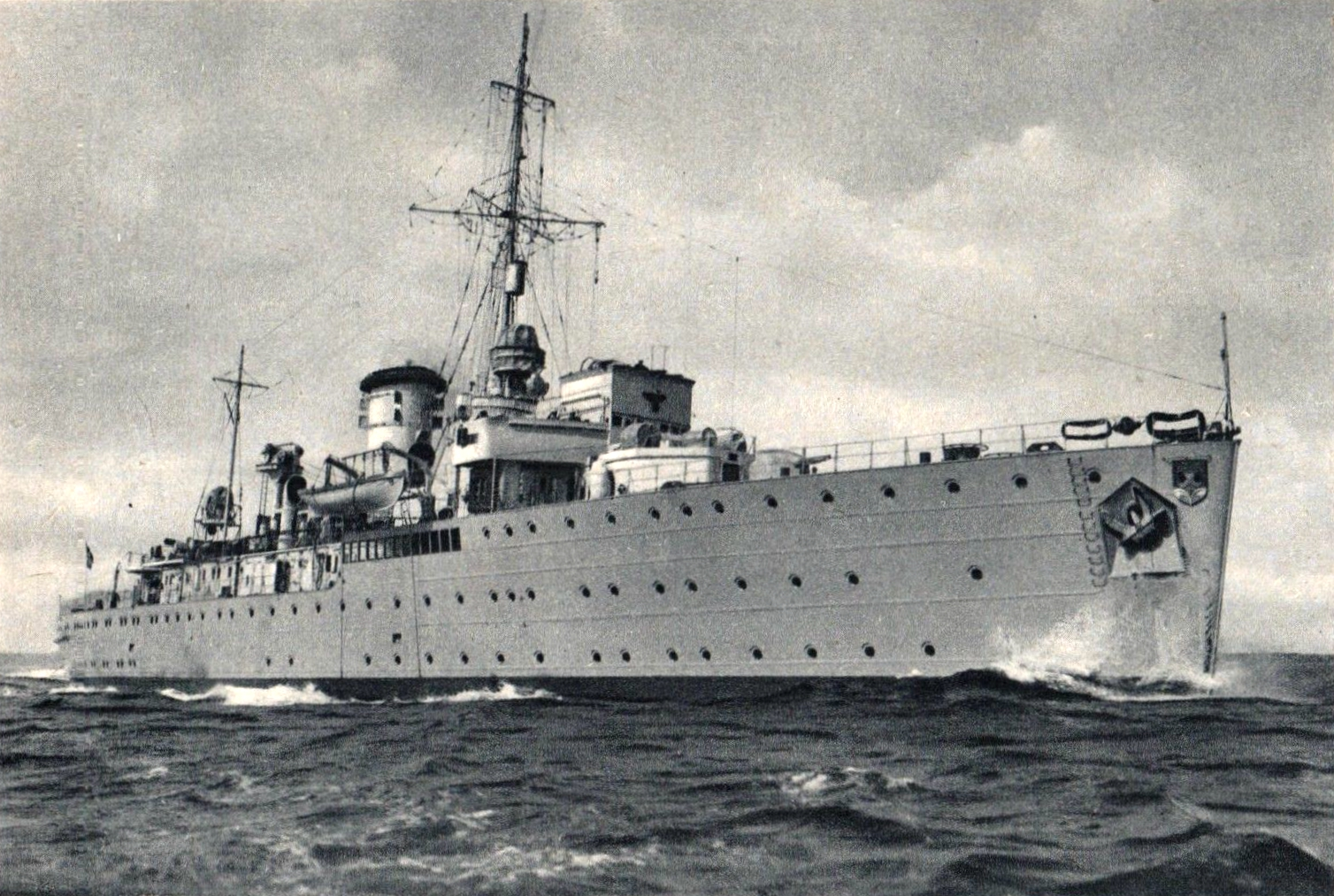 德国海军青岛号鱼雷艇保障舰